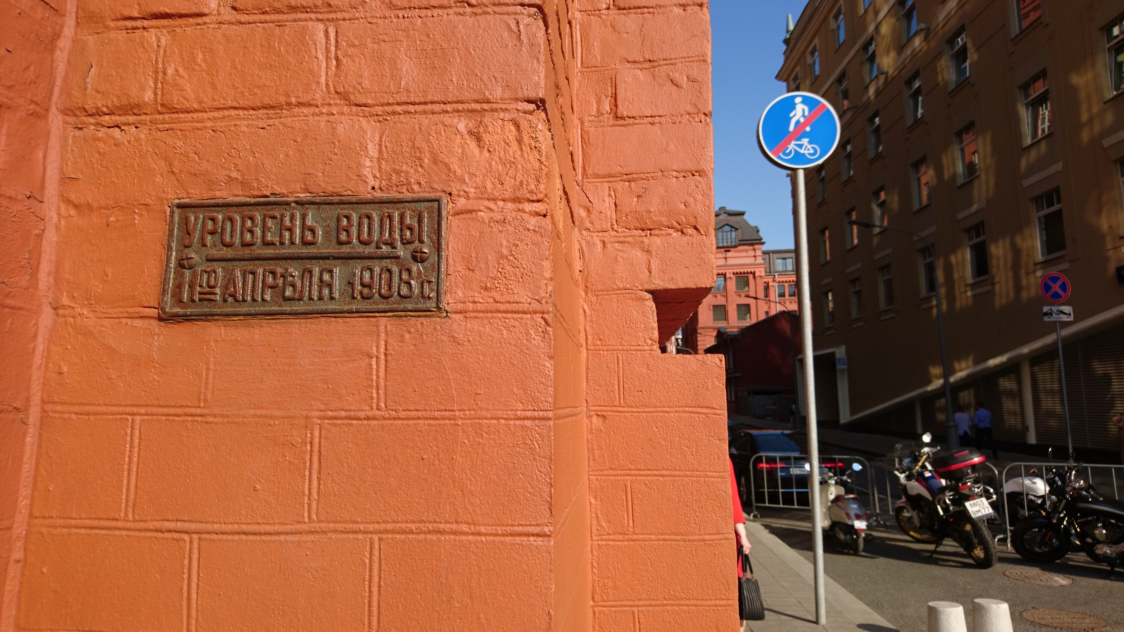 Отметка об уровне воды во время наводнения 1908 года на доме №4, стр. 1 по Якиманской набережной (правая сторона дома)